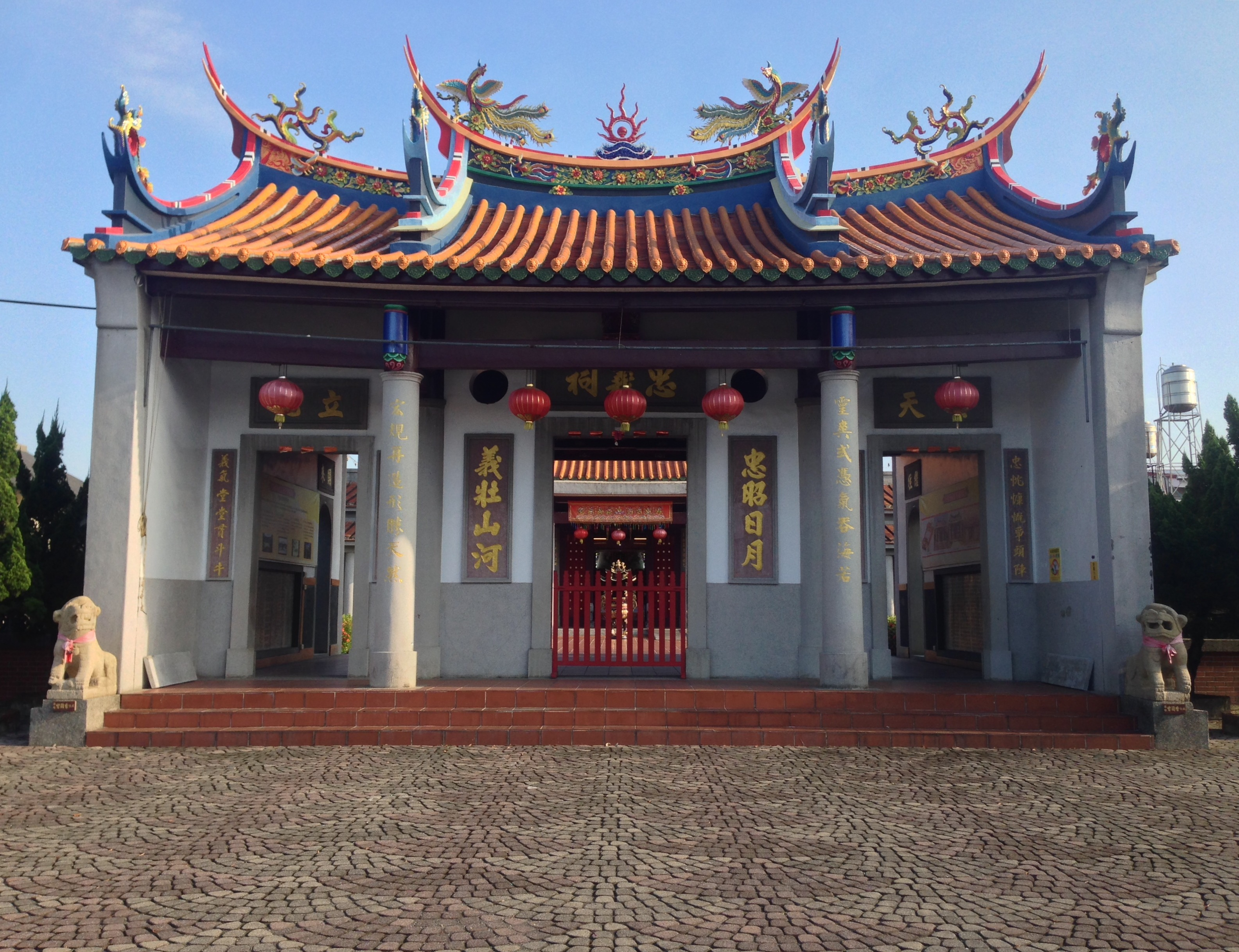 六堆忠義祠三川殿